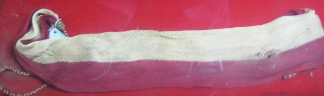 2do Banda Presidencial de Agustin Gamarra.